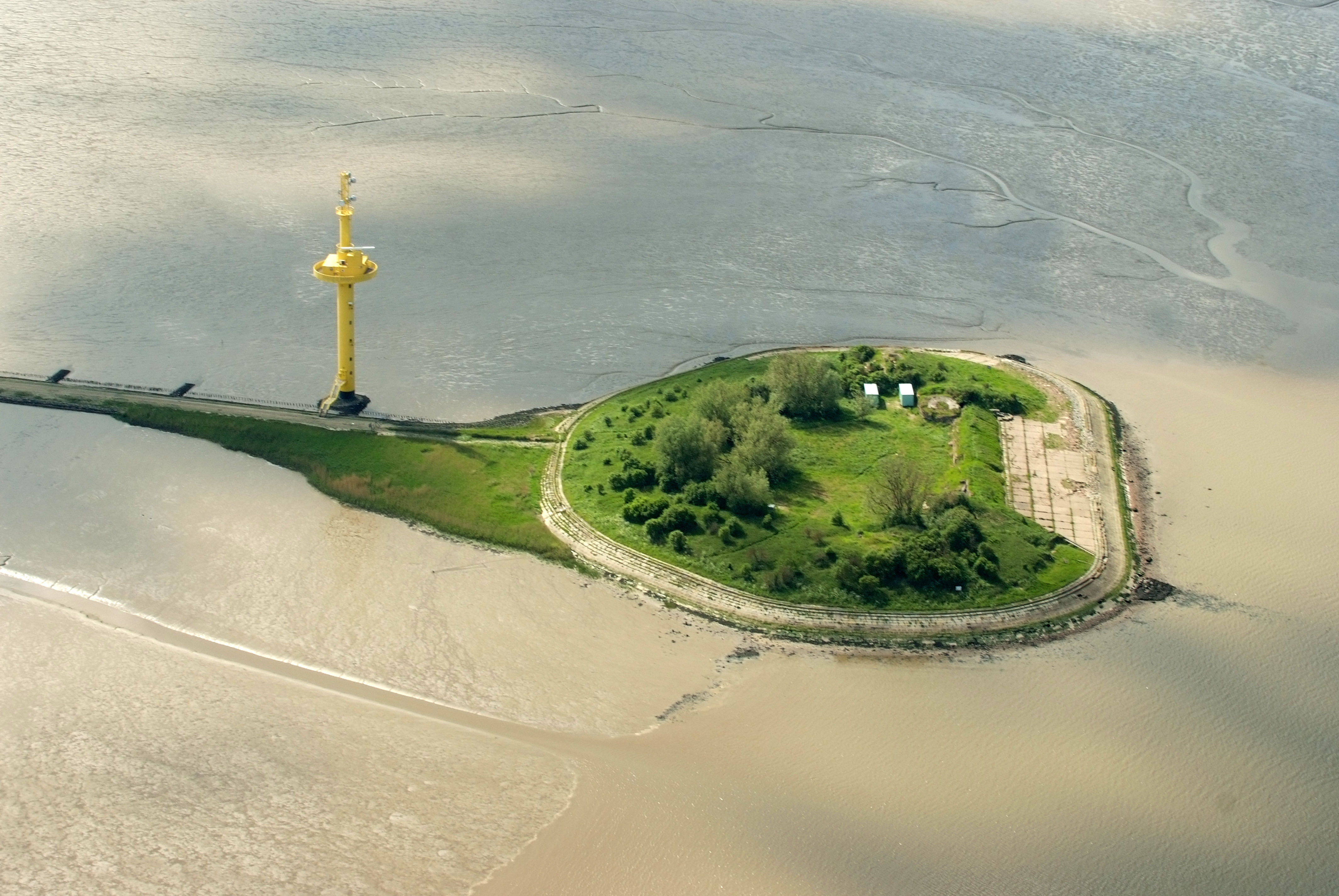 Insel Langlütjen I mit Radarturm Fotoflug vom Flugplatz Nordholz-Spieka über Bremerhaven, Wilhelmshaven und die Ostfriesischen Inseln bis Borkum